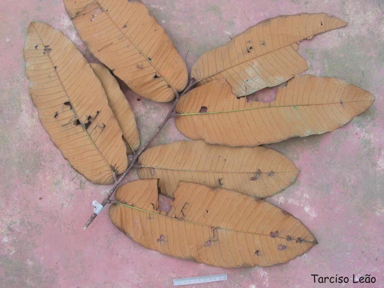 Local: Mata do Sabiá, Cabo de Santo Agostinho, Pernambuco, Brasil. Tipo de veg.: Floresta Ombrófila Densa Habito: árvore